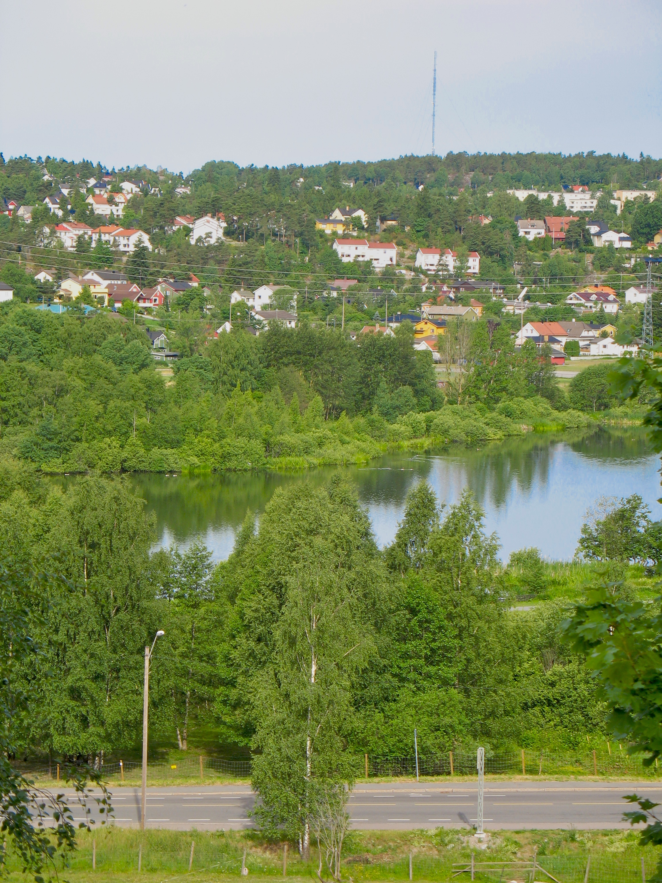 Østensjøvannet i Oslo. Like bak ligger bebyggelsen på Abildsø, bakerst til høyre områdene rundt Brattlikollen T-bane